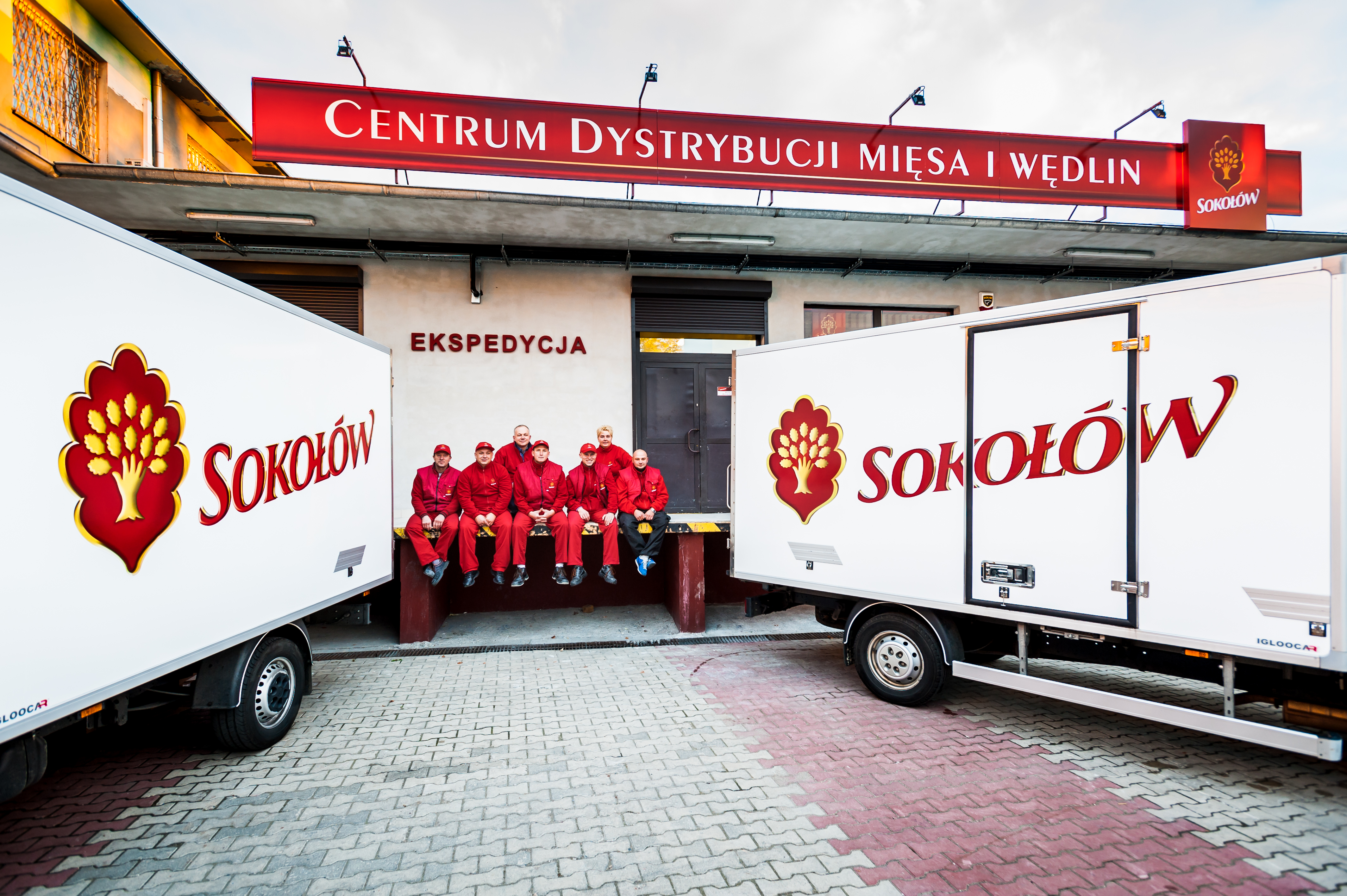 Sokołów SA - centrum dystrybucyjne